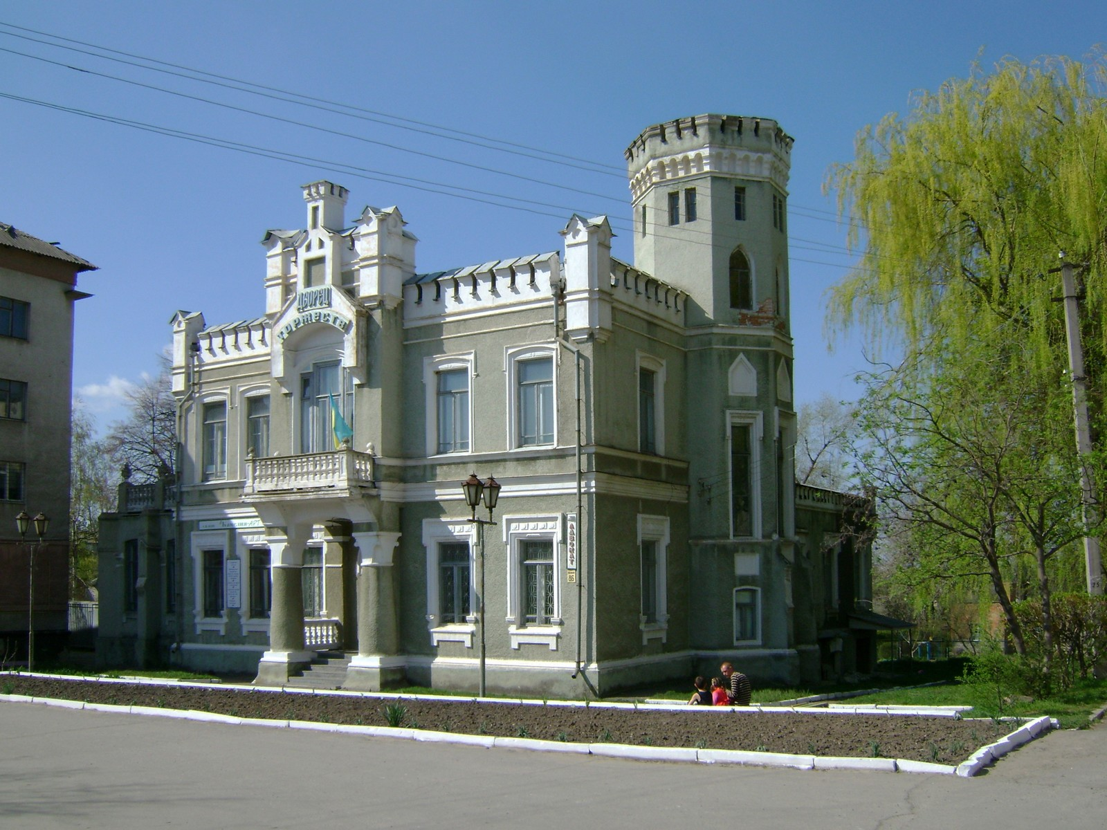 Тульчинская синагога (ныне ЗАГС).